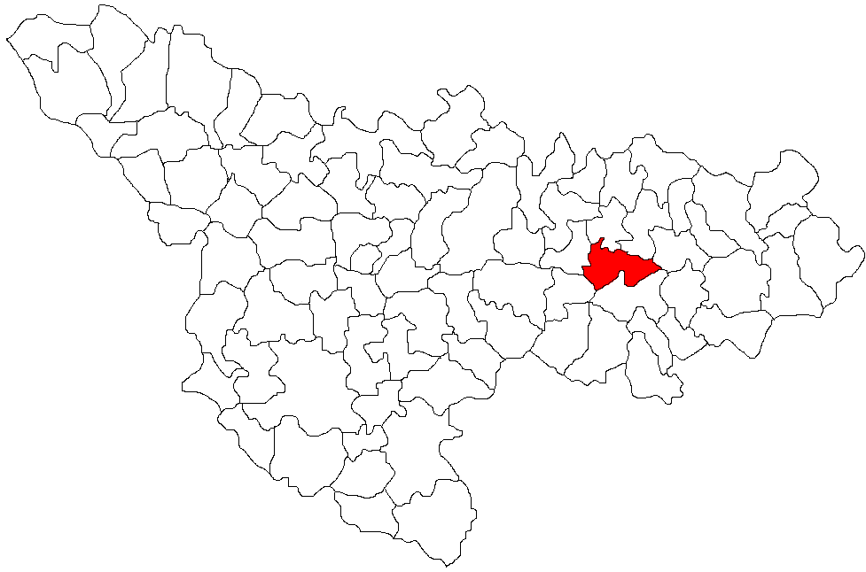 Costeiu, Timis Licensing Categorie:Hărţi ale judeţului Timiş